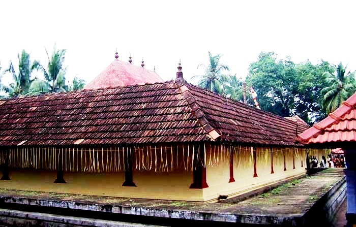 തൃപ്രങ്ങോട് ശിവക്ഷേത്രം